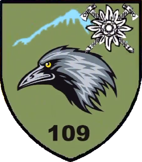 Нарукавний знак, 109 окремий гірсько-штурмовий батальйон